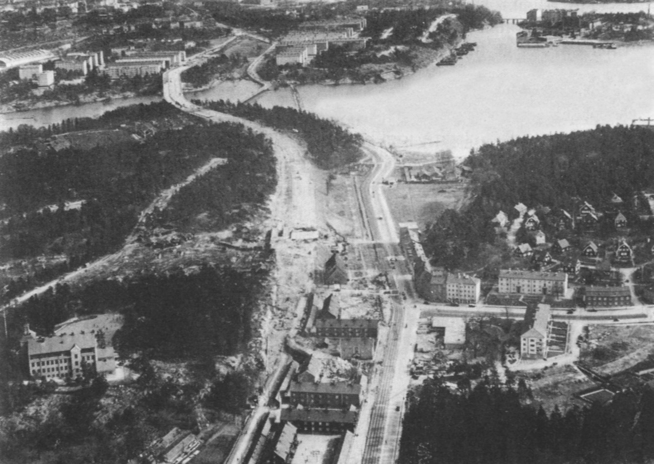 Vy över nuvarande Alviksplan och uppfarten till Tranebergsbron. Brommabiografen står kvar ännu idag, men nödbostäderna är rivna.